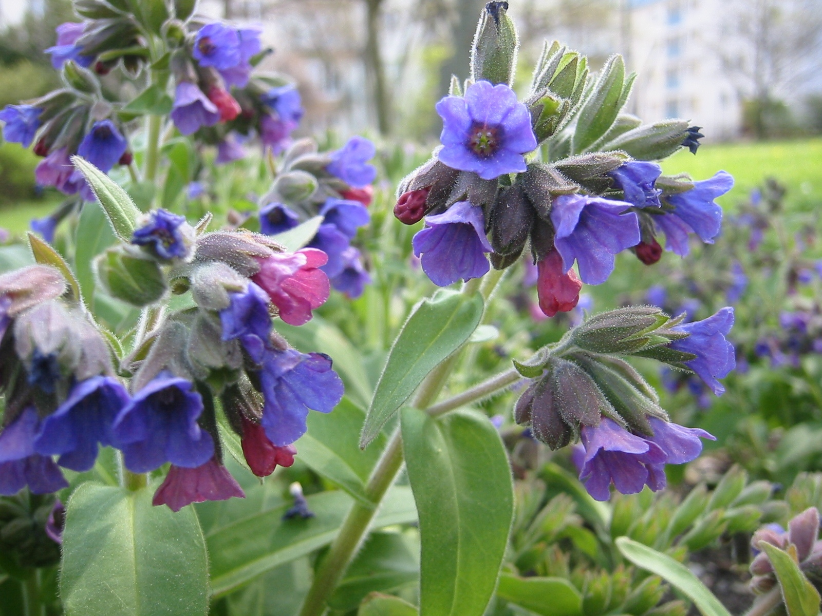 Pulmonaria_mollis; Botanic Garden, Vienna, Austria.